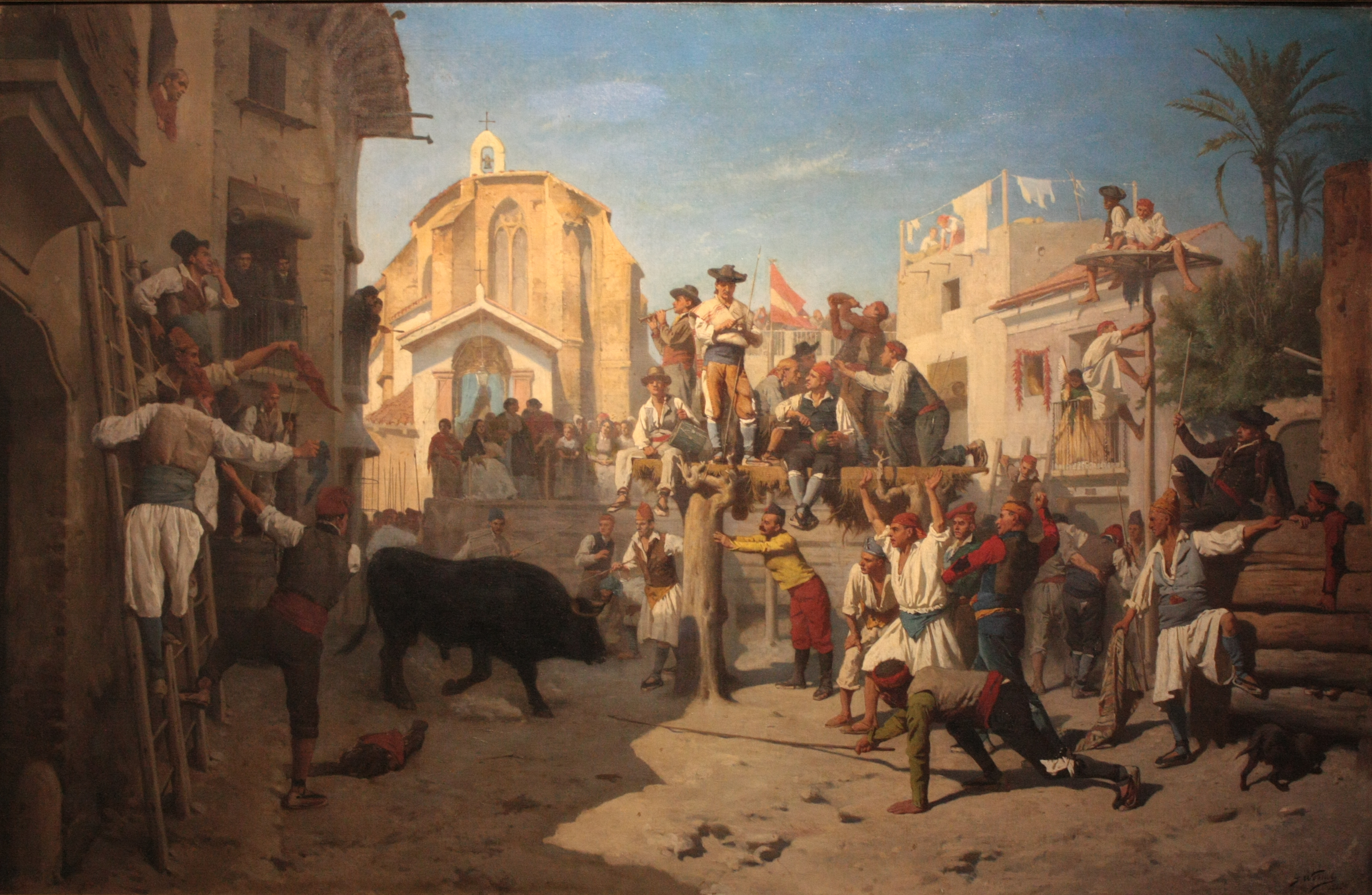 Course de novillos dans la province de Valence par Jules Worms